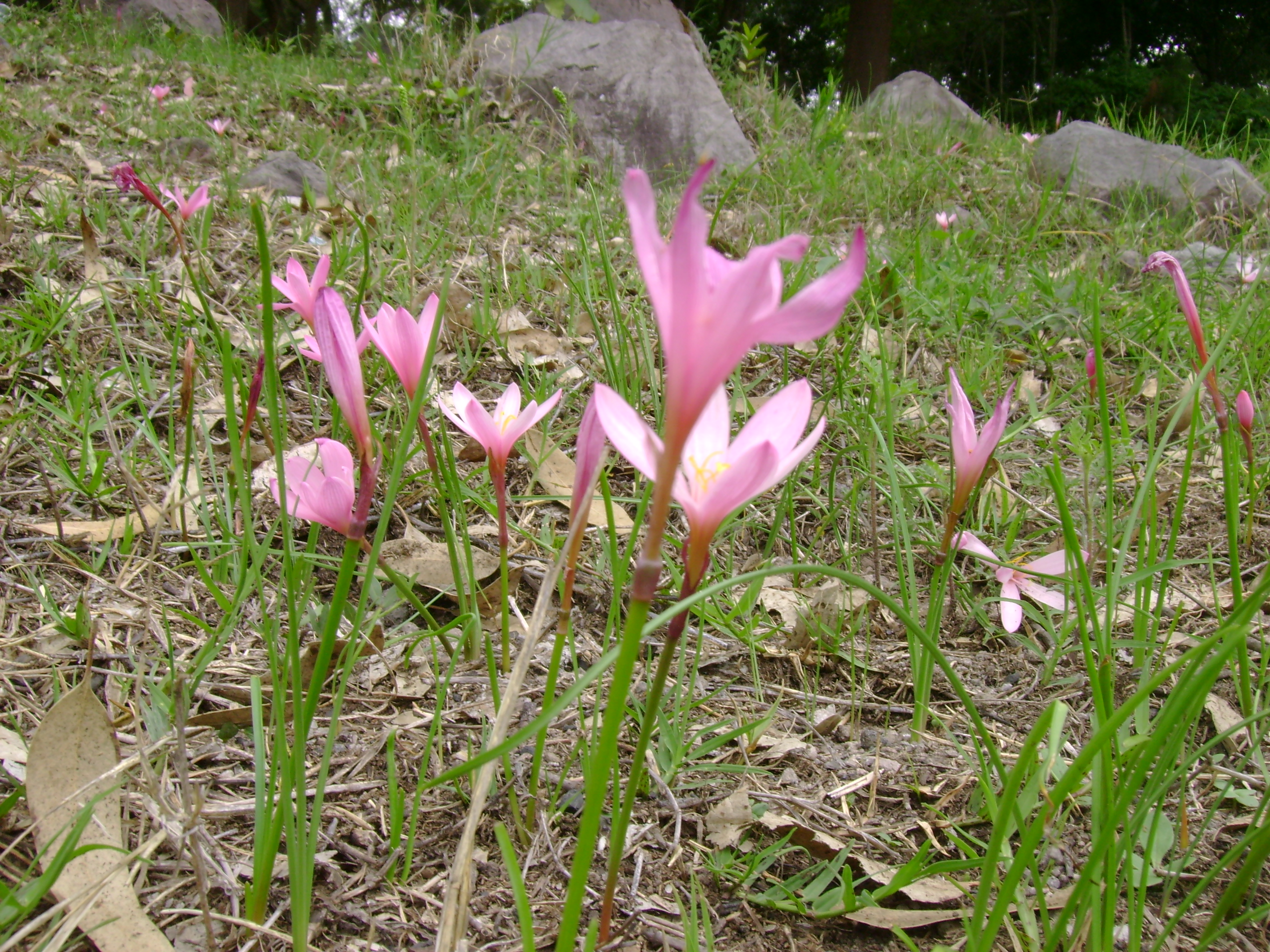 Vista 2 de flores rosas en la Laguna de Carrizalillo, en Comala, Colima